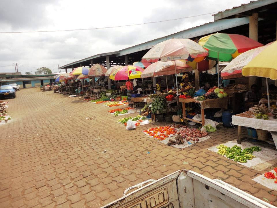 Ruelle du Marché de Ntoum dans la province de l'Estuaire au Gabon